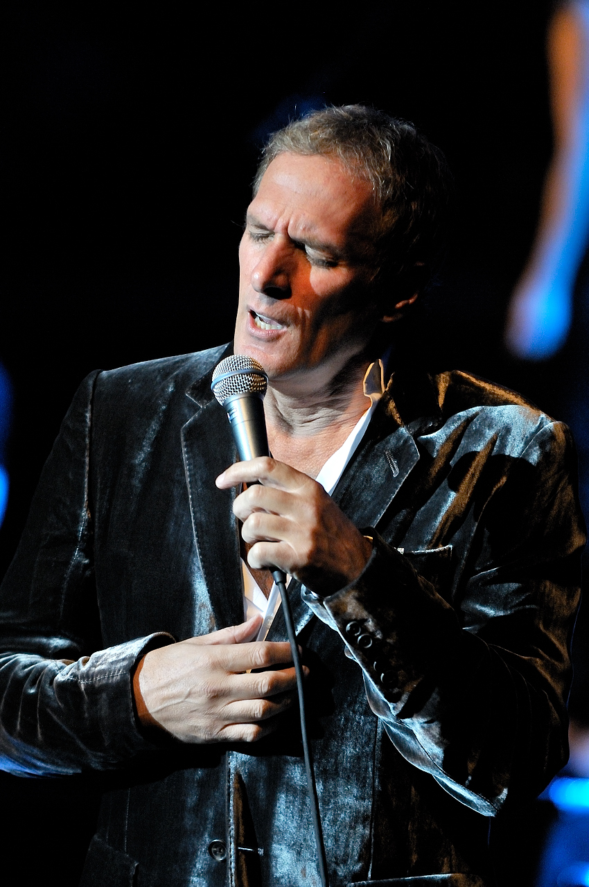 Michael Bolton en el Palau de la Música de Barcelona el 14 de Enero de 2010